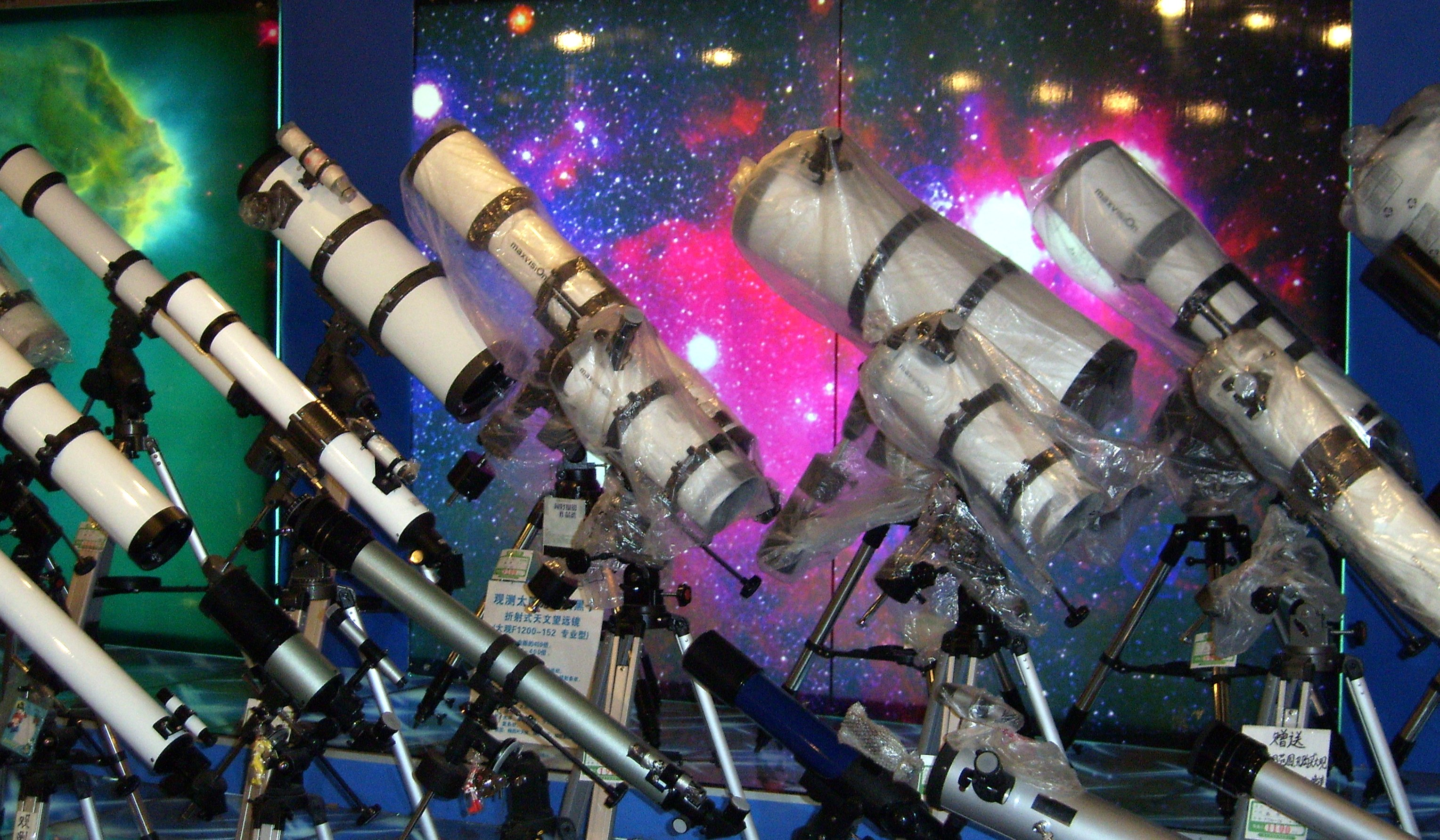 北京天文馆销售的各种天文望远镜